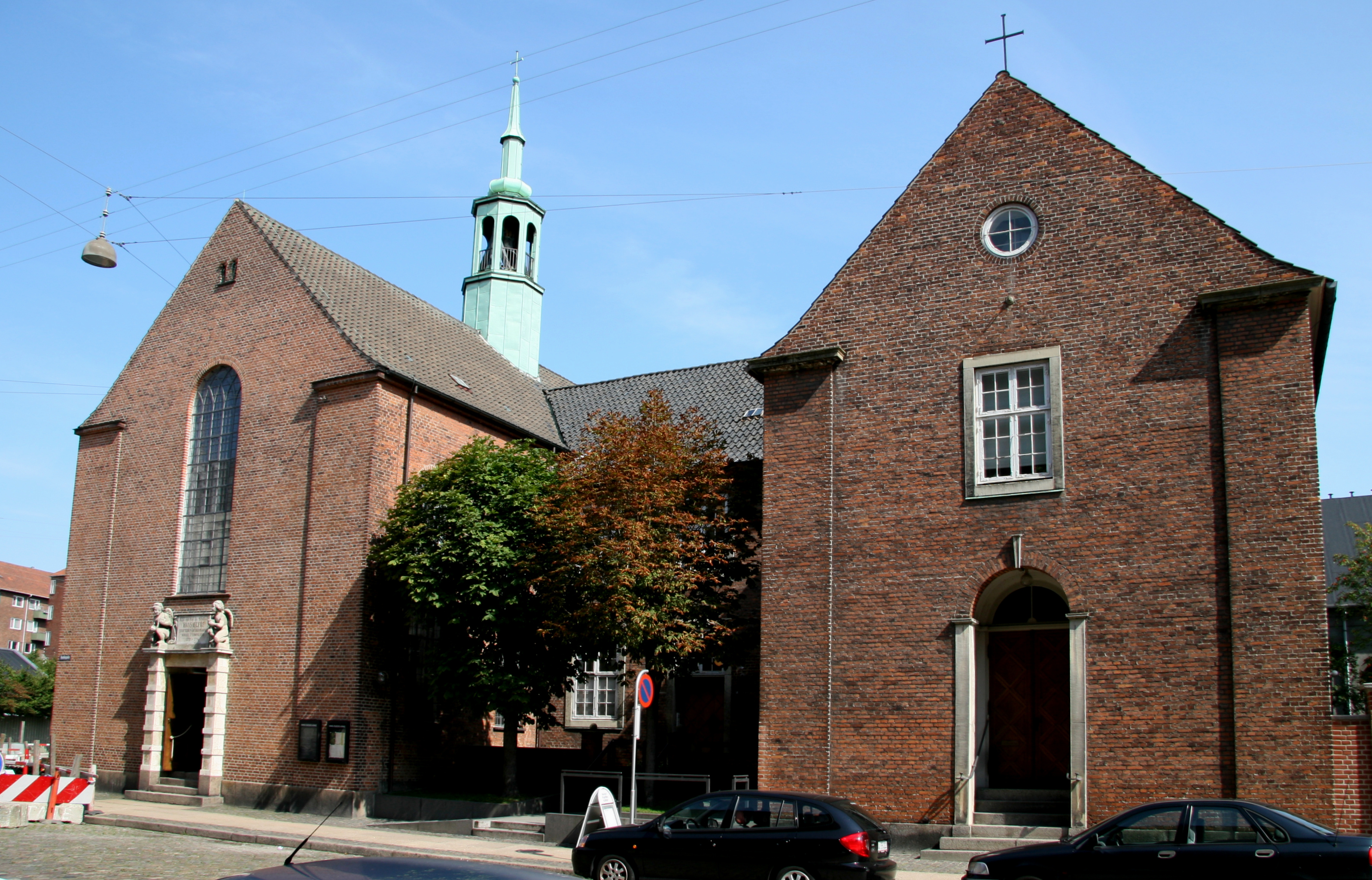 Hans Egeds Kirke in Copenhagen, Denmark. Other view.